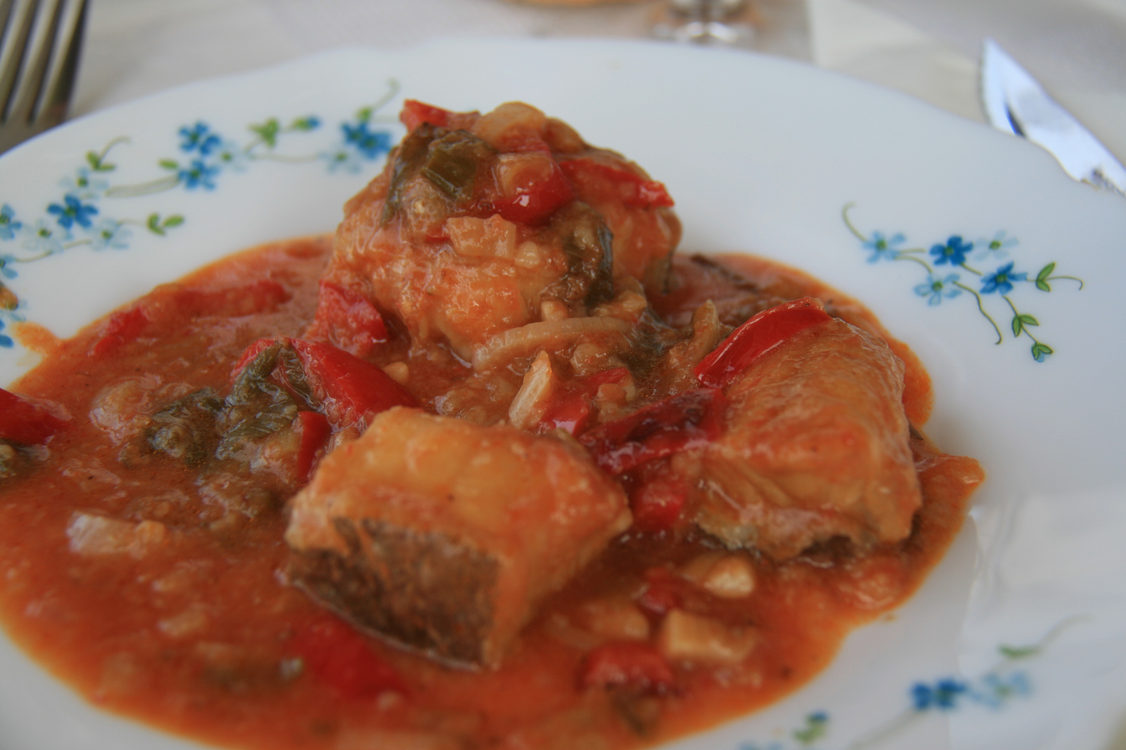 Bacalao en salsa de Tomate